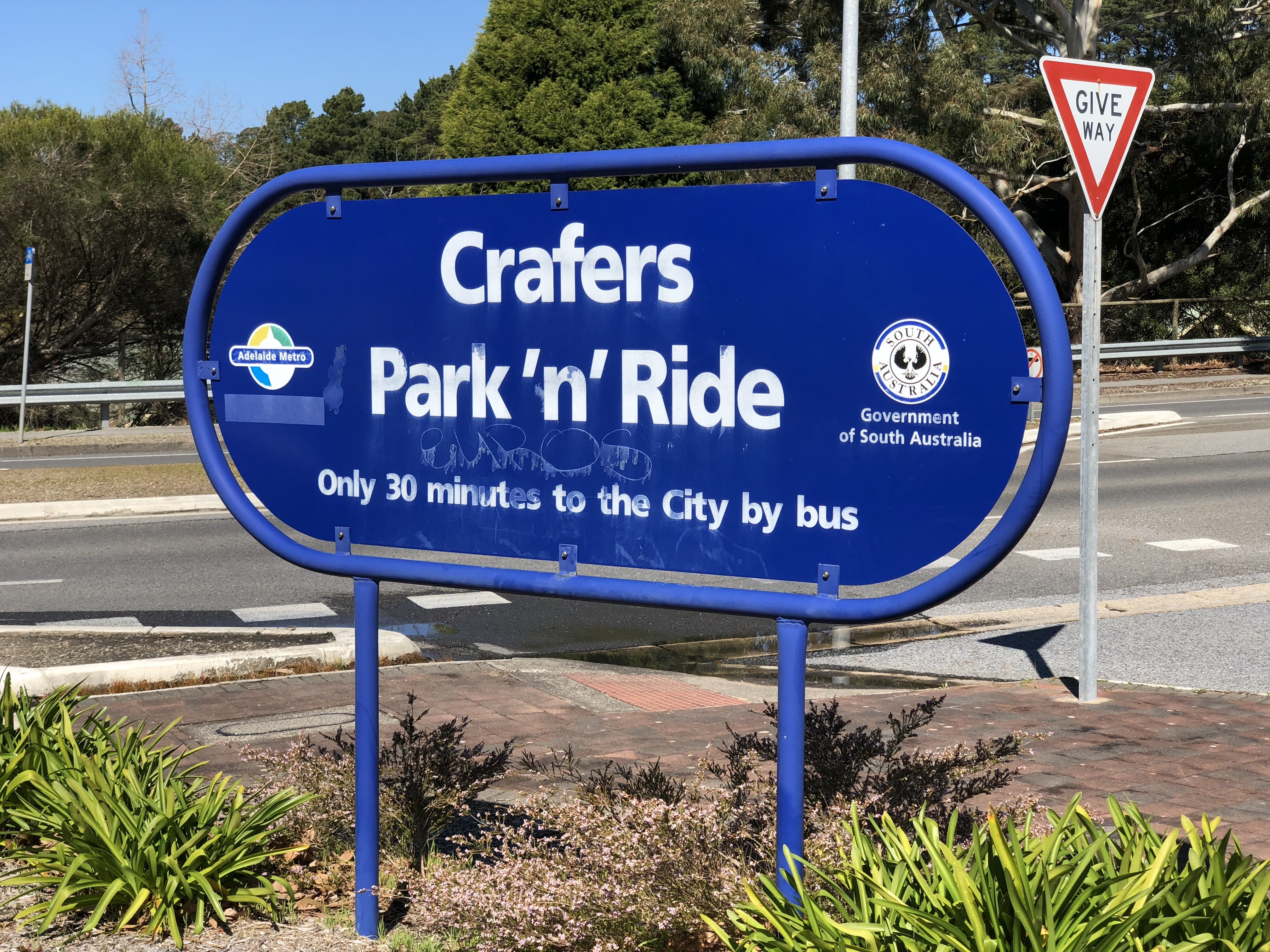 中文（香港）: 嘉佛士轉乘巴士泊車處（Crafers Park 'n' Ride）是嘉佛士一個公共運輸交匯處，不少東南郊區居民都會將汽車停泊於此，轉乘巴士到阿德萊德。